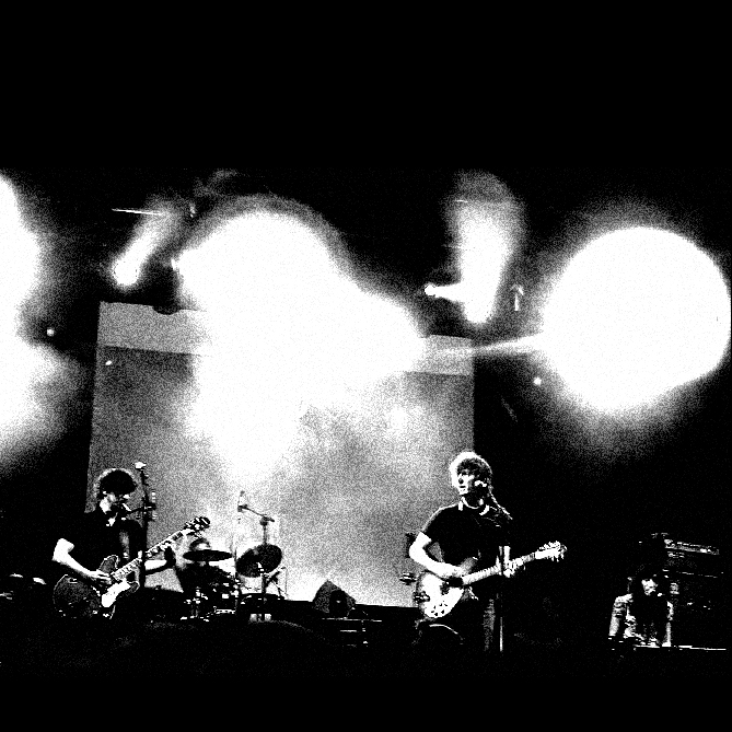 Tarik y la Fábrica de Colores